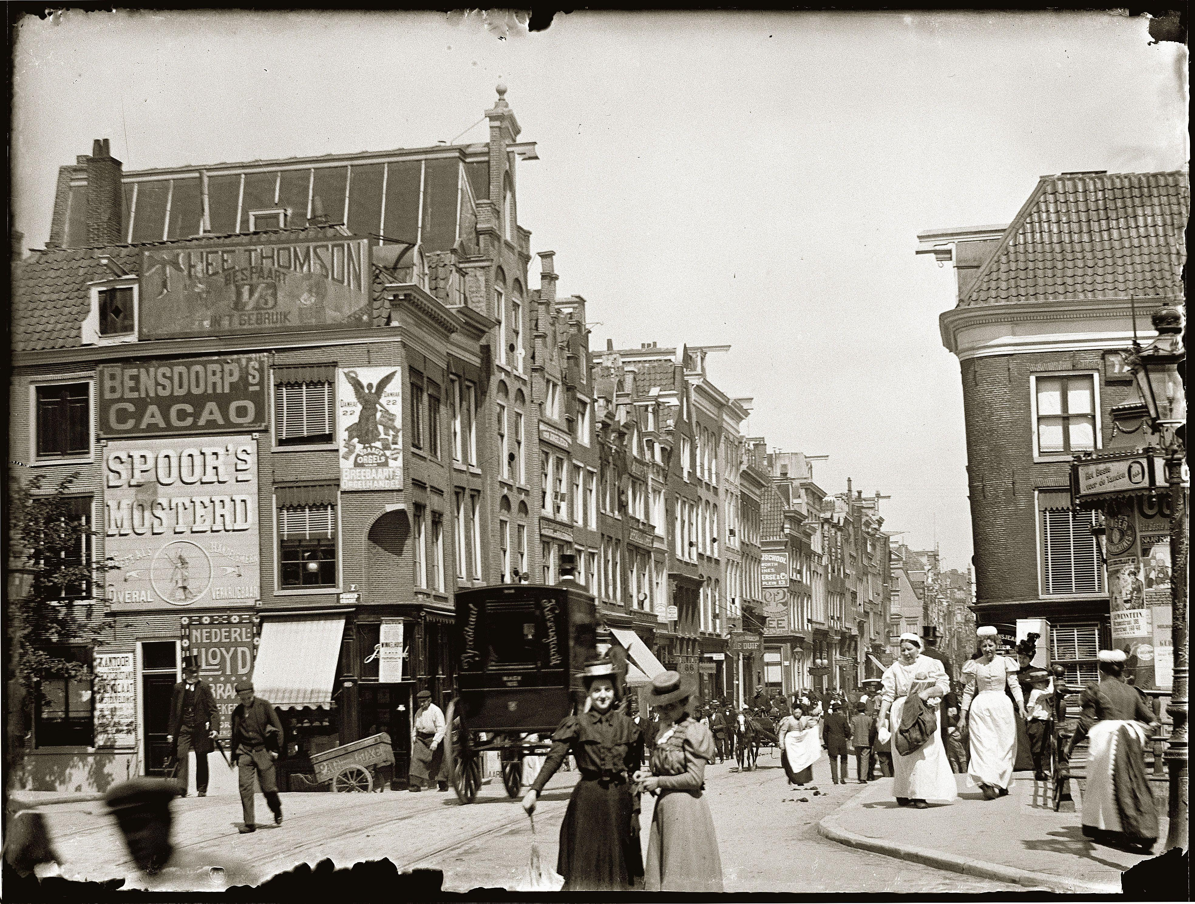 Beschrijving Utrechtsestraat 78-102 (v.r.n.l.) Gezien vanuit Utrechtsestraat 119``, hoek Prinsengracht``, apotheek van E.W.Ansingh``, richting Keizersgracht. In het midden is ingang Kerkstraat. Op de voorgrond de zusjes Christiene (1880-1933) en Marietje (1884-1975) Bouchier. Documenttype foto Vervaardiger Olie``, Jacob (1834-1905) Collectie Collectie Jacob Olie Jbz. Datering 20 juli 1898 Geografische naam Utrechtsestraat Inventarissen Afbeeldingsbestand 10019A000256 Generated with Dememorixer